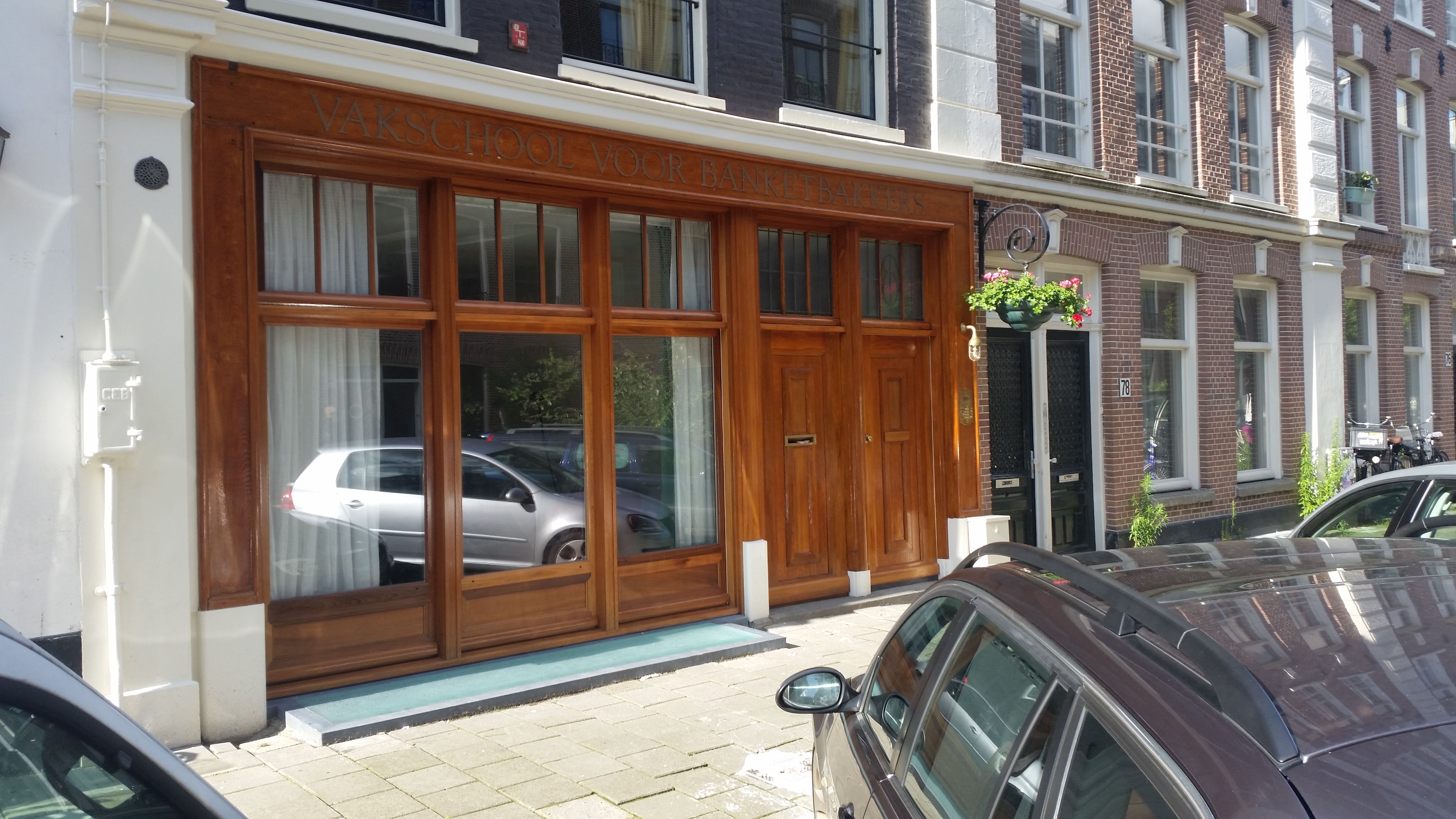 Begane grond van Quellijnstraat 80 Amsterdam met in de bovenrand Vakschool voor banketbakkers (juli 2020)